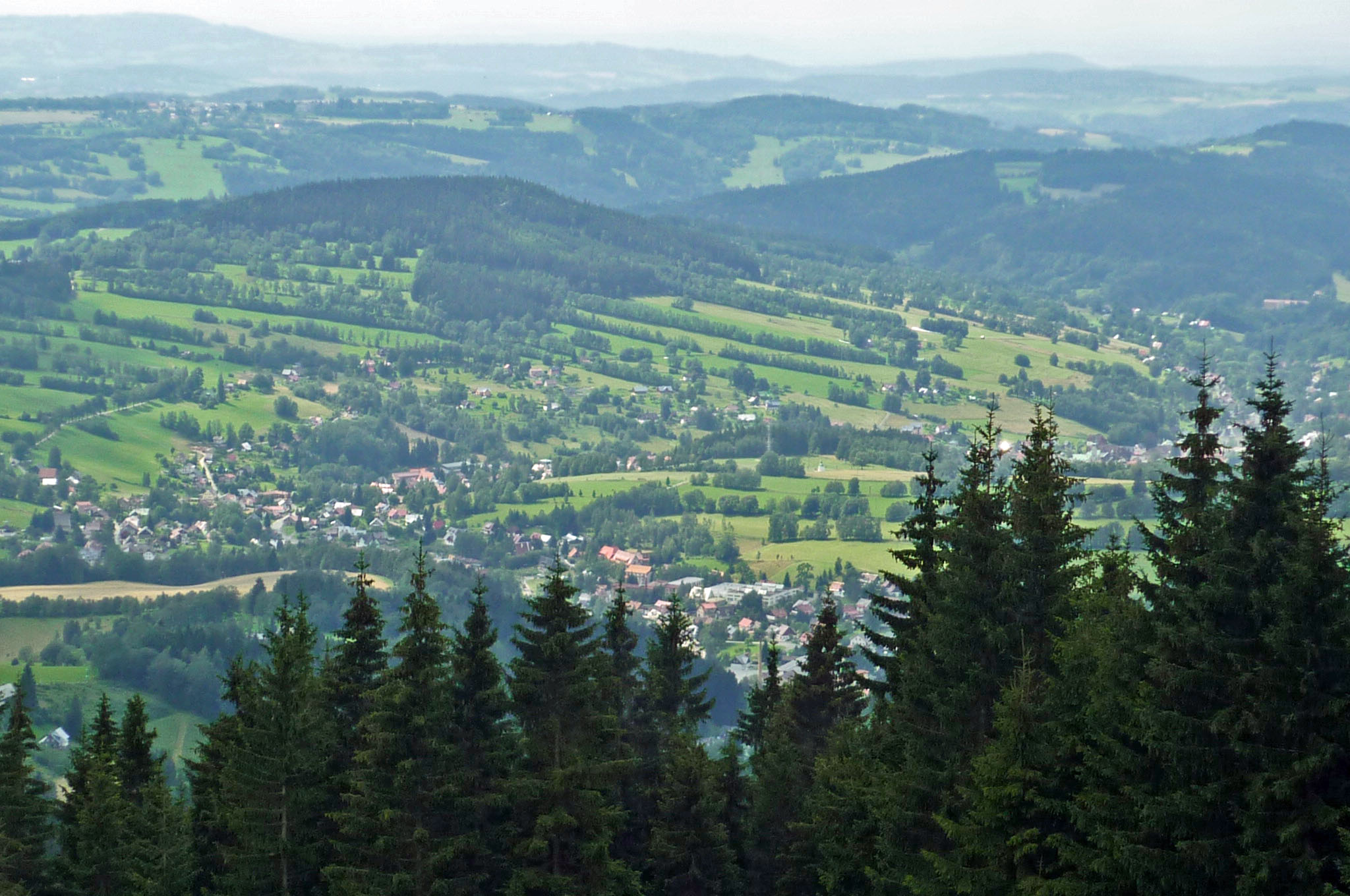 Blick von der Hofbaude auf Rochlitz im Riesengebirge